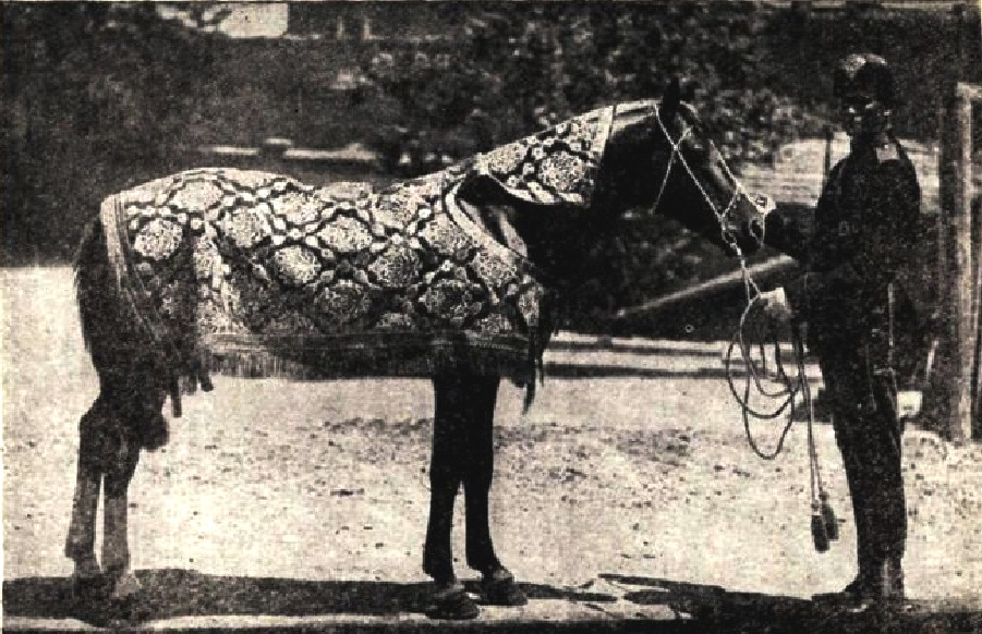 Карабахский конь, подаренный в дар Великой княжне Ксении Александровне 1 мая 1892 г.